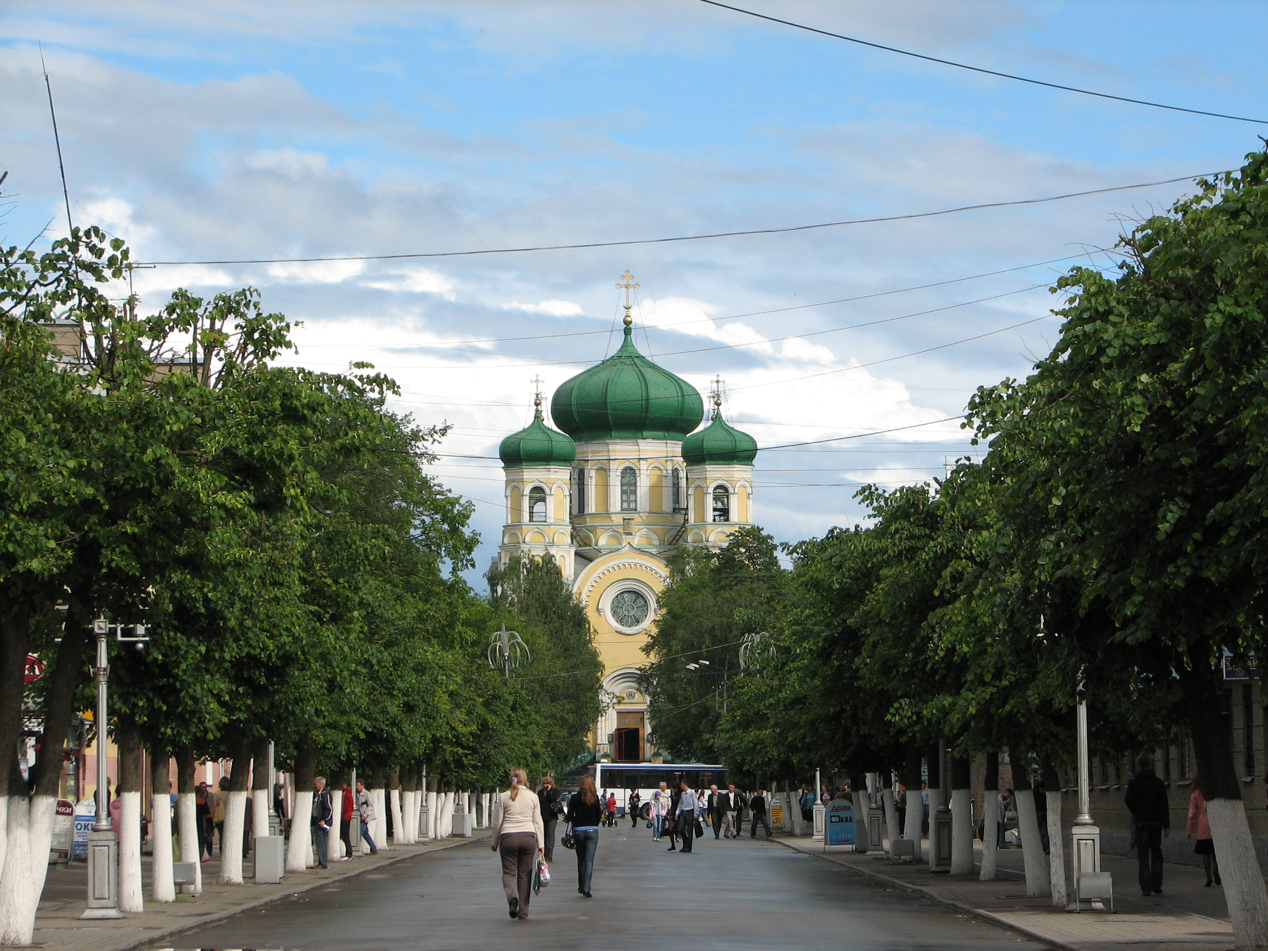 Соборная улица и собор Святого апостола Павла в Гатчине